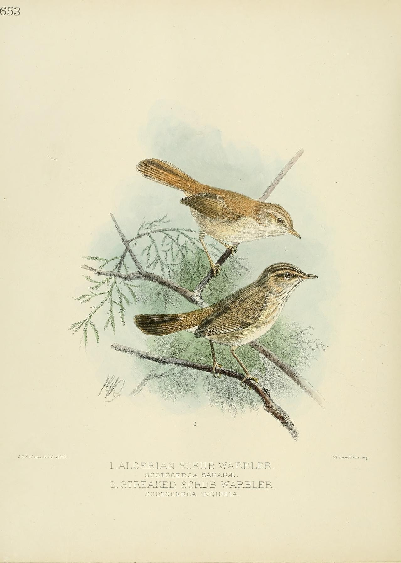 G.KsuLemarLs daLetlith.. 1.ALG-ER1AN SCPvUB VfARBLER. SCOTOCERCA SAHARA. 2-. STREAKED SCRUB WARBLER. SCOTOCERCA 1NQUIETA. Iffinbsrn. Br-^s . imp .